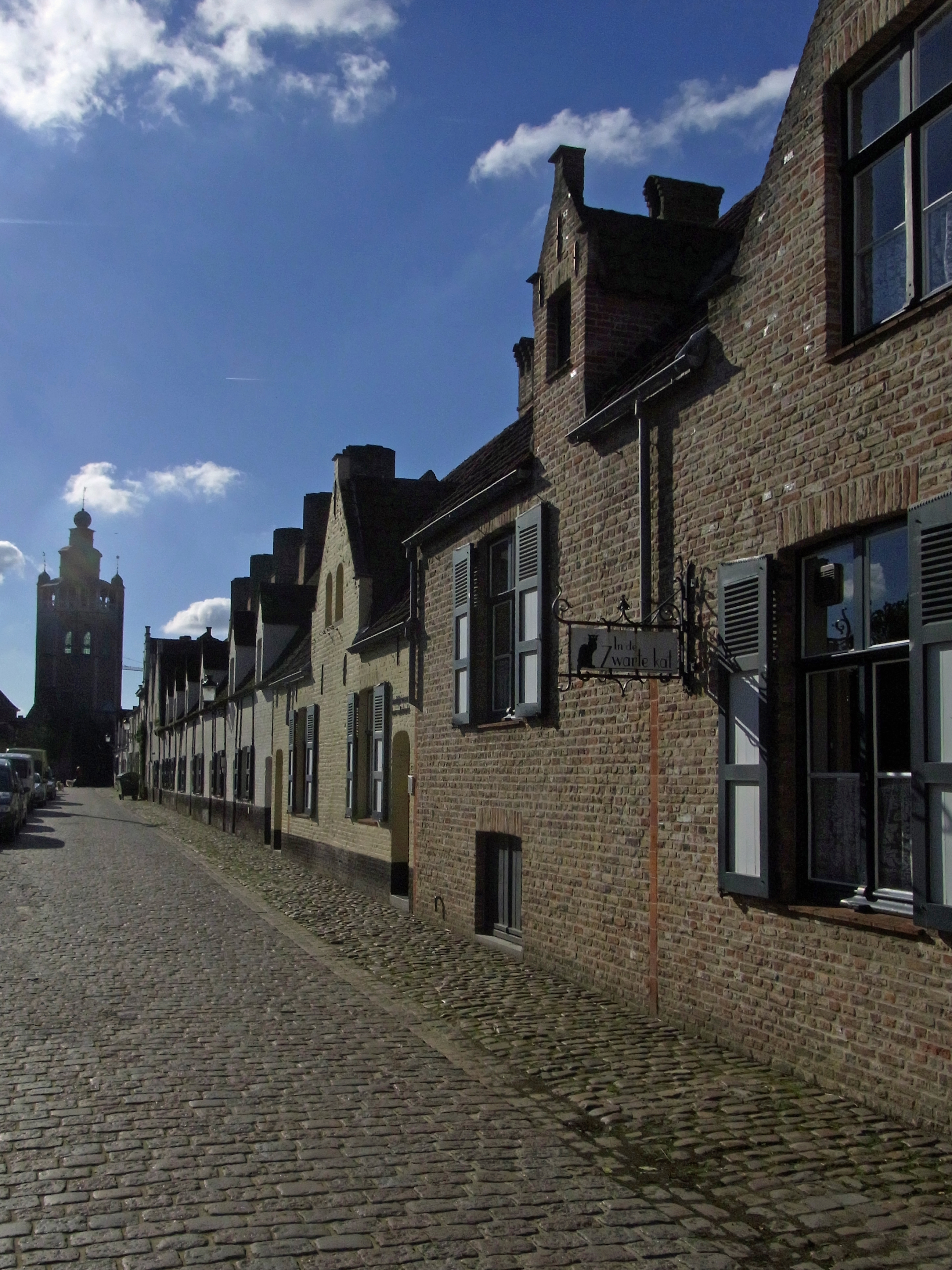 Brügge: Balstraat